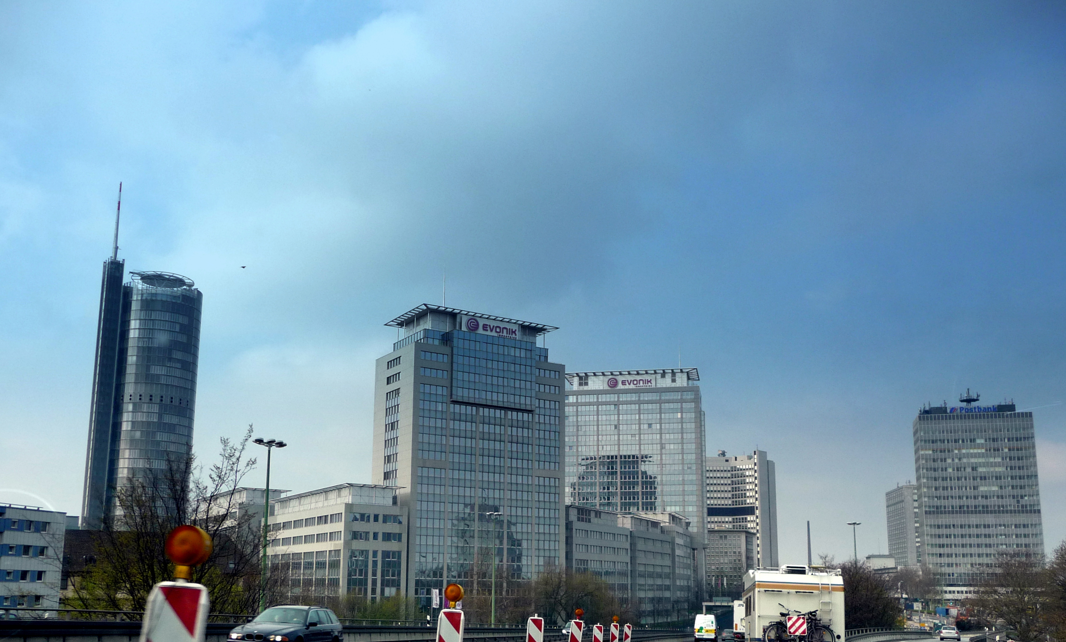 Essen 2010-04-12 – Skyline von der A40 aus